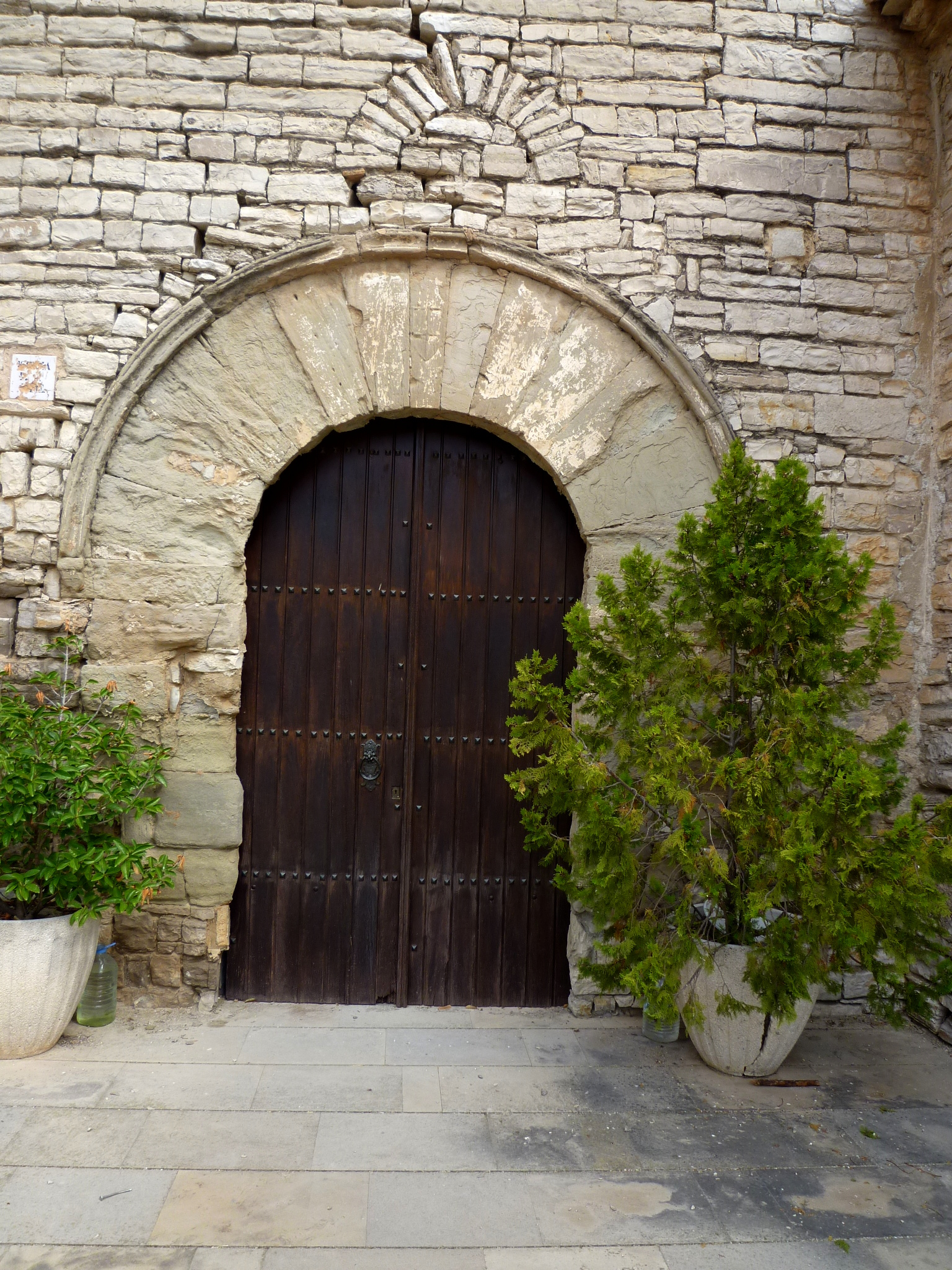 Església parroquial de Sant Jaume de Montpalau (Ribera d'Ondara), portada